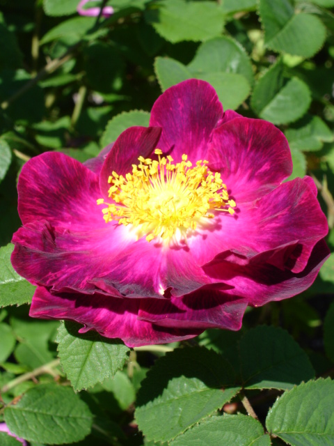 Rosa Hybrid Gallica 'Alain Blanchard'